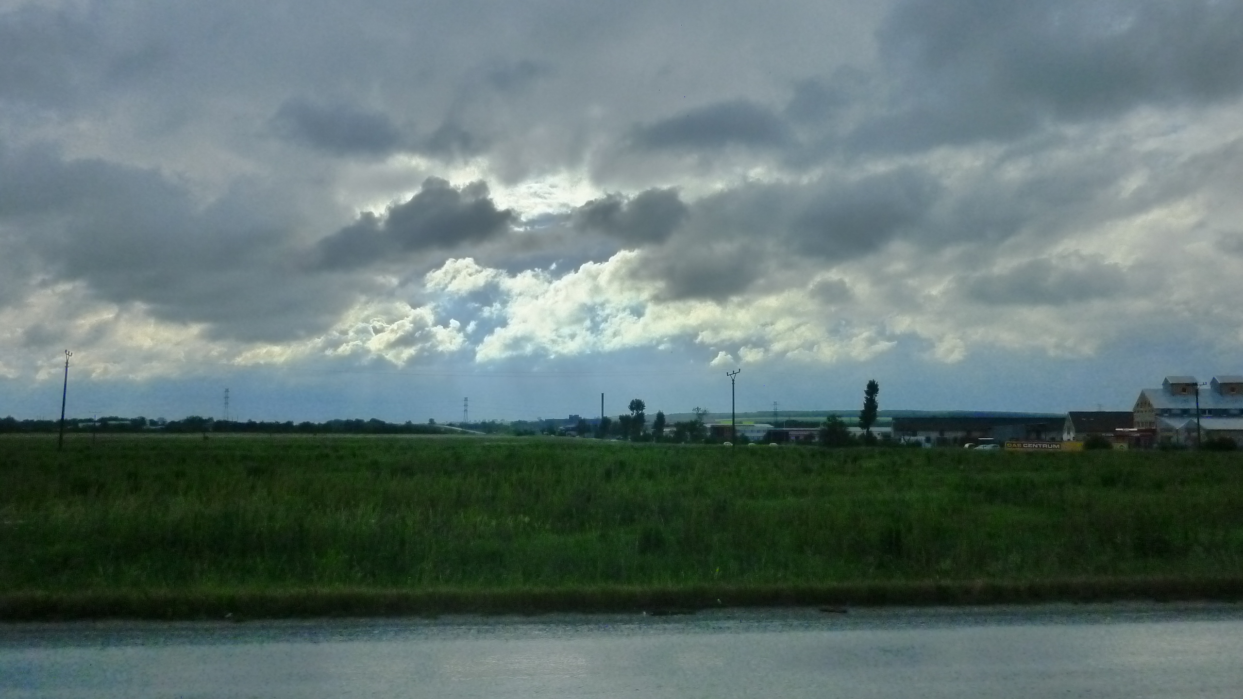 ŤAŽKÉ MRAKY NAD PEZINKOM - HEAVY CLOUDS ABOVE PEZINOK